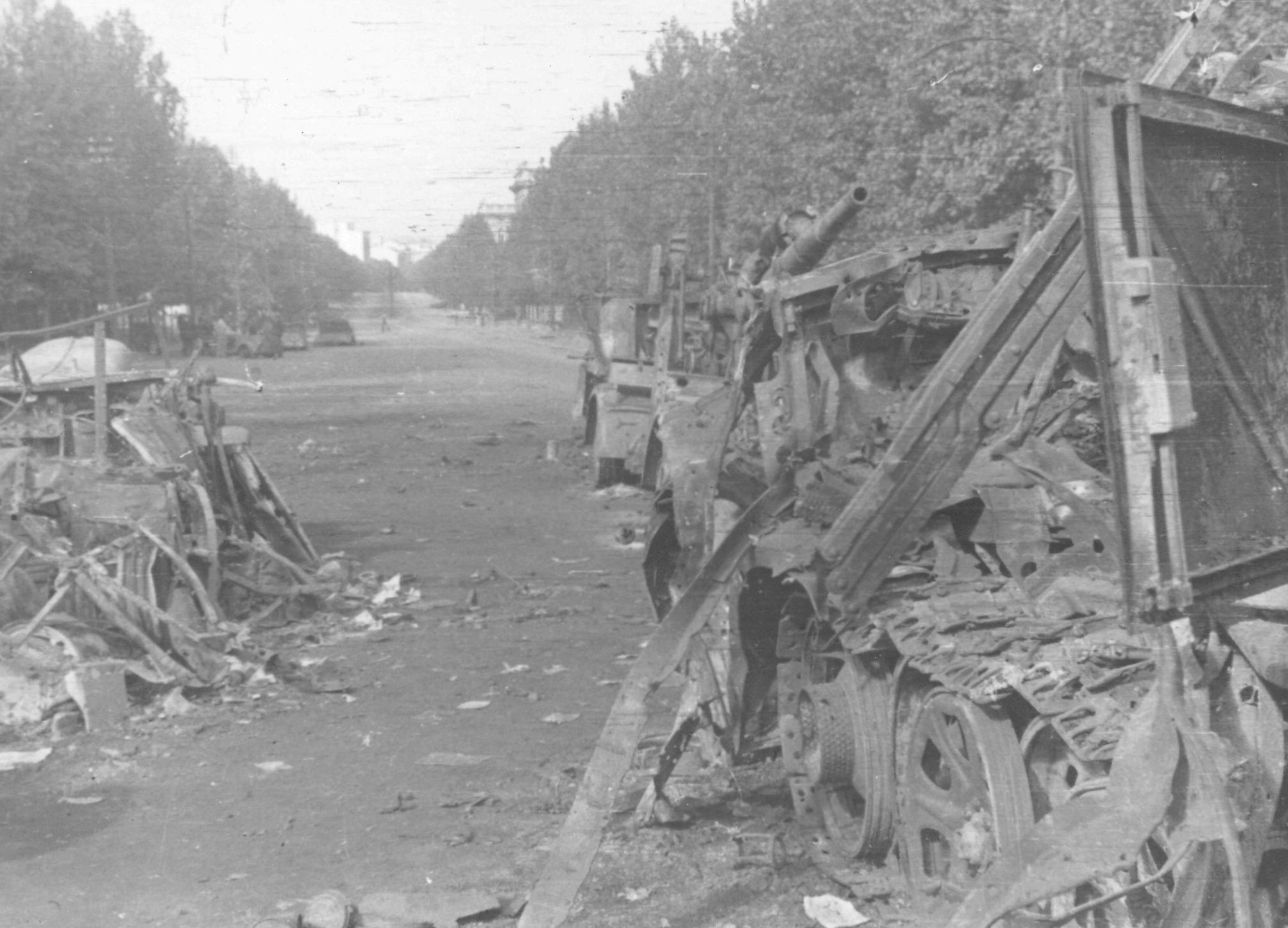 Srpskohrvatski / српскохрватски: Uništena nemačka motorizovana kolona na Bulevaru Revolucije u Beogradu oktobra 1944.